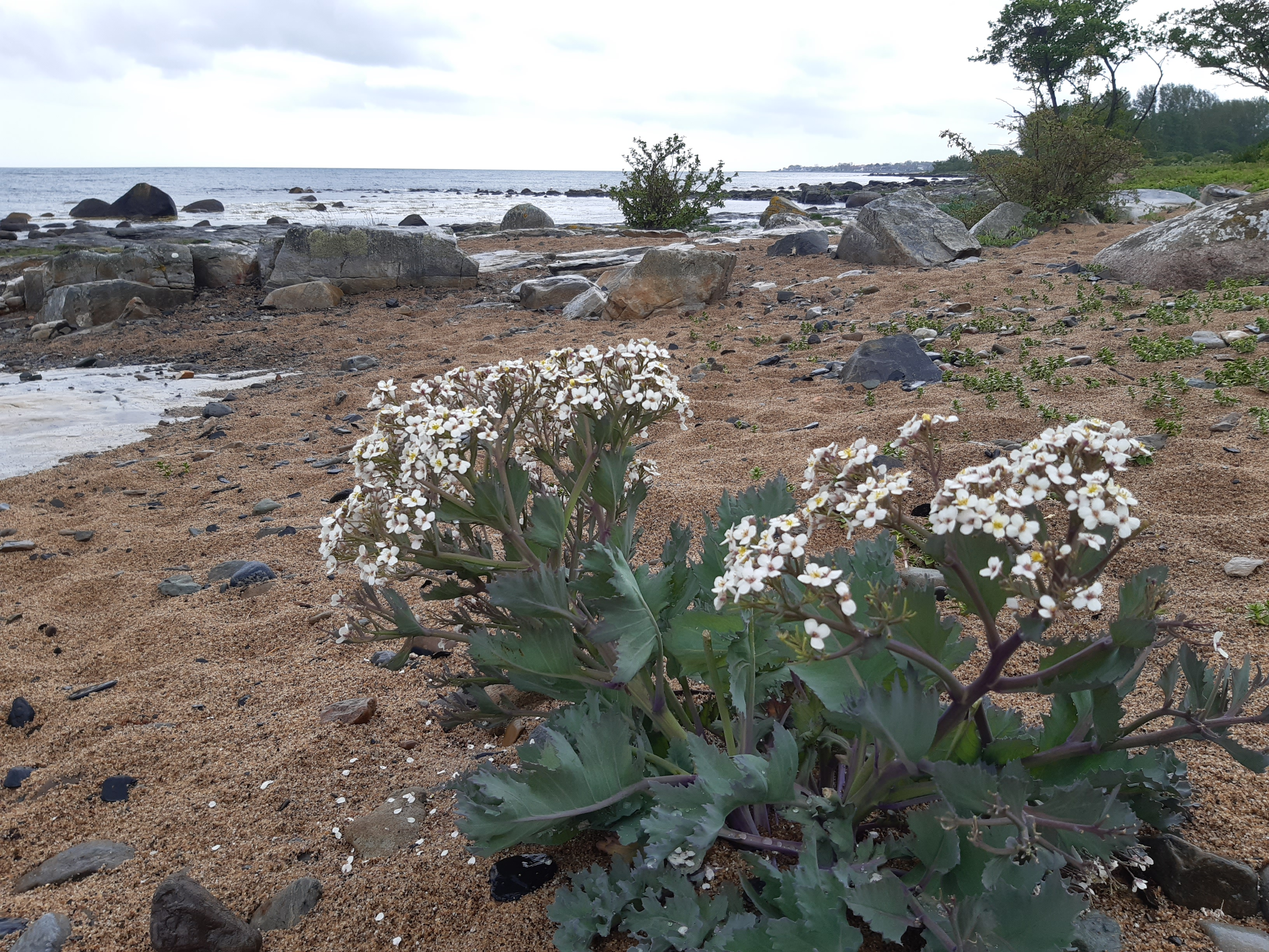 Blommande strandkål på Simris strandäng